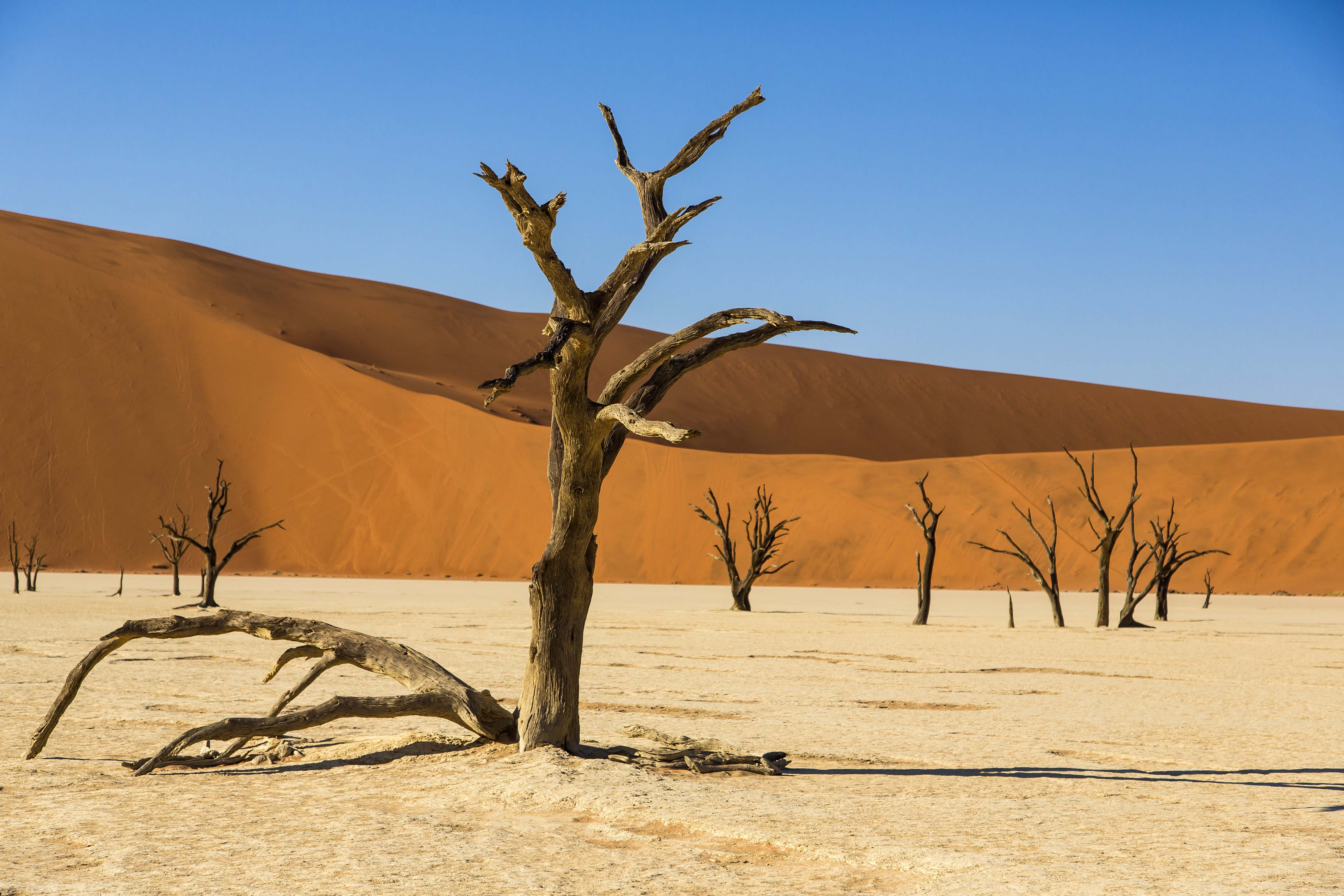 Abgestorbene Akazien im Deadvlei, Namibia